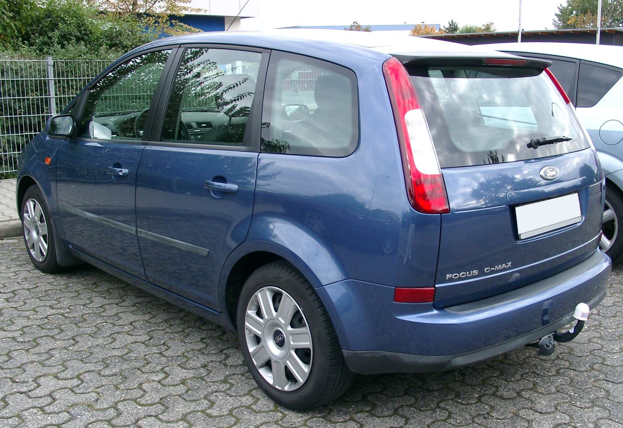 Ford C-MAX